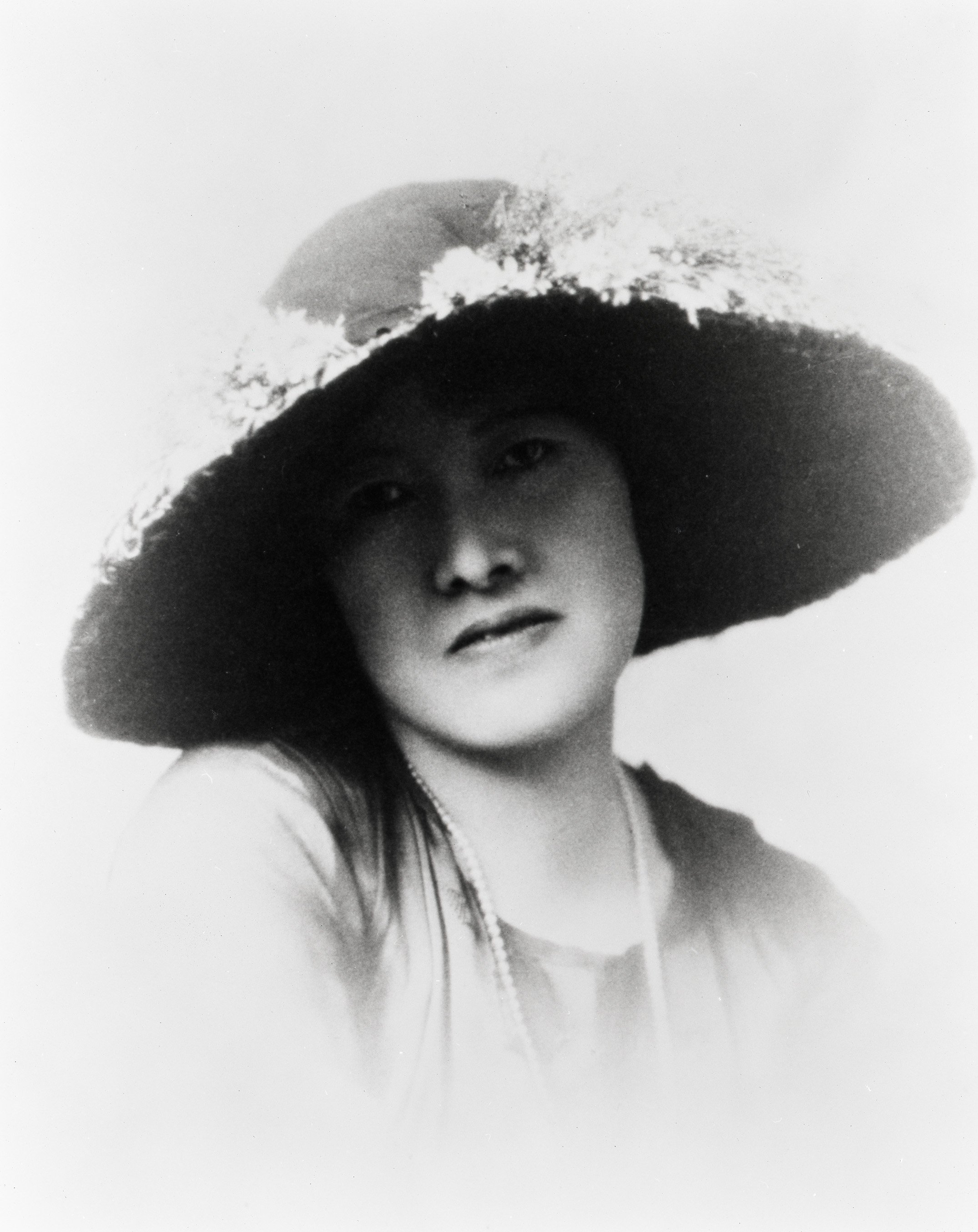 Japanese poet/writer Akiko Yosano (与謝野晶子, 1878–1942)